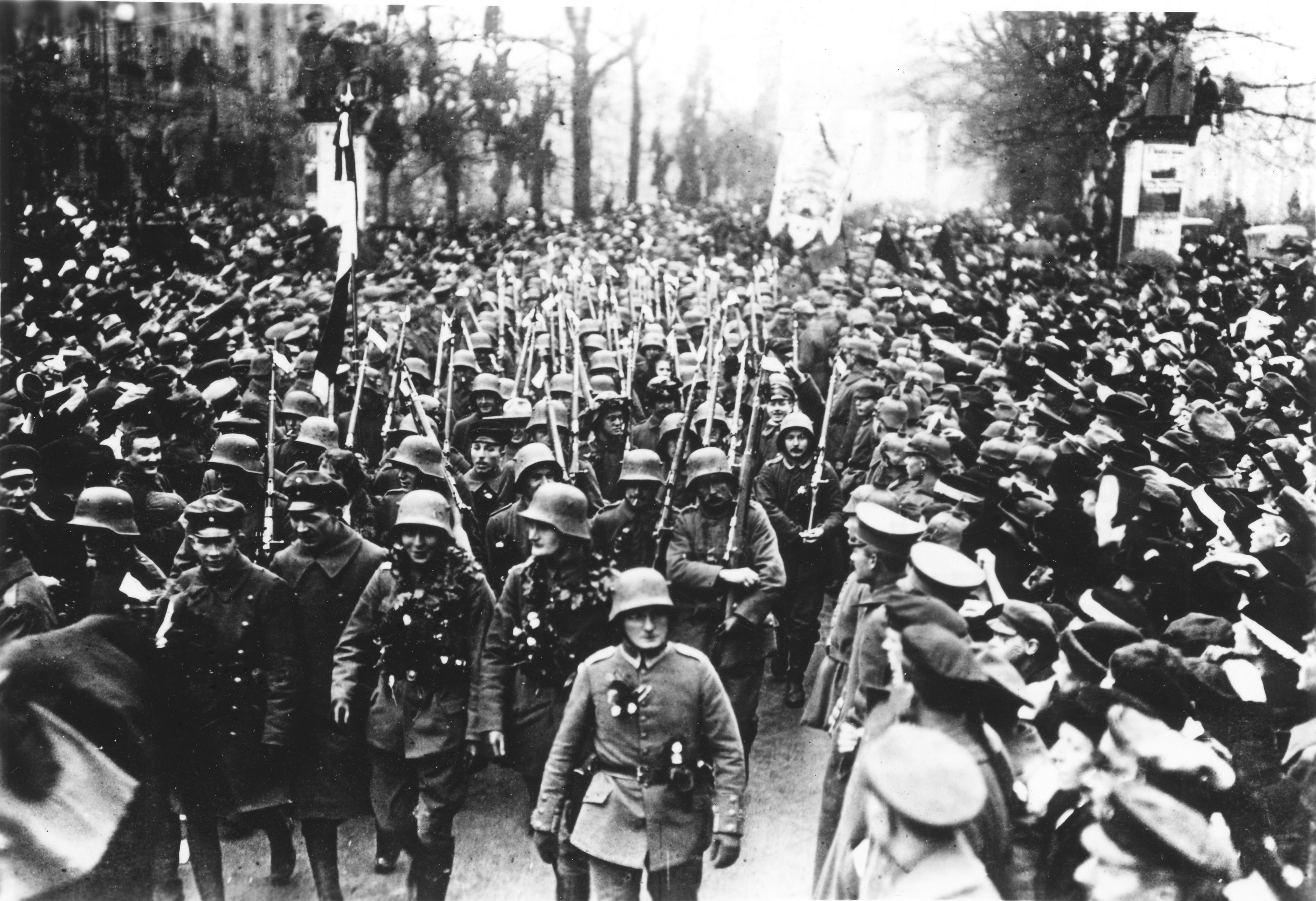 Nach Unterzeichnung des Waffenstillstandes von Compiegne am 11.11.1918 kehren die deutschen Fronttruppen in ihre Vorkriegsgarnisonen zurück. UBz.: Einmarsch der Truppen Anfang Dezember in Berlin.